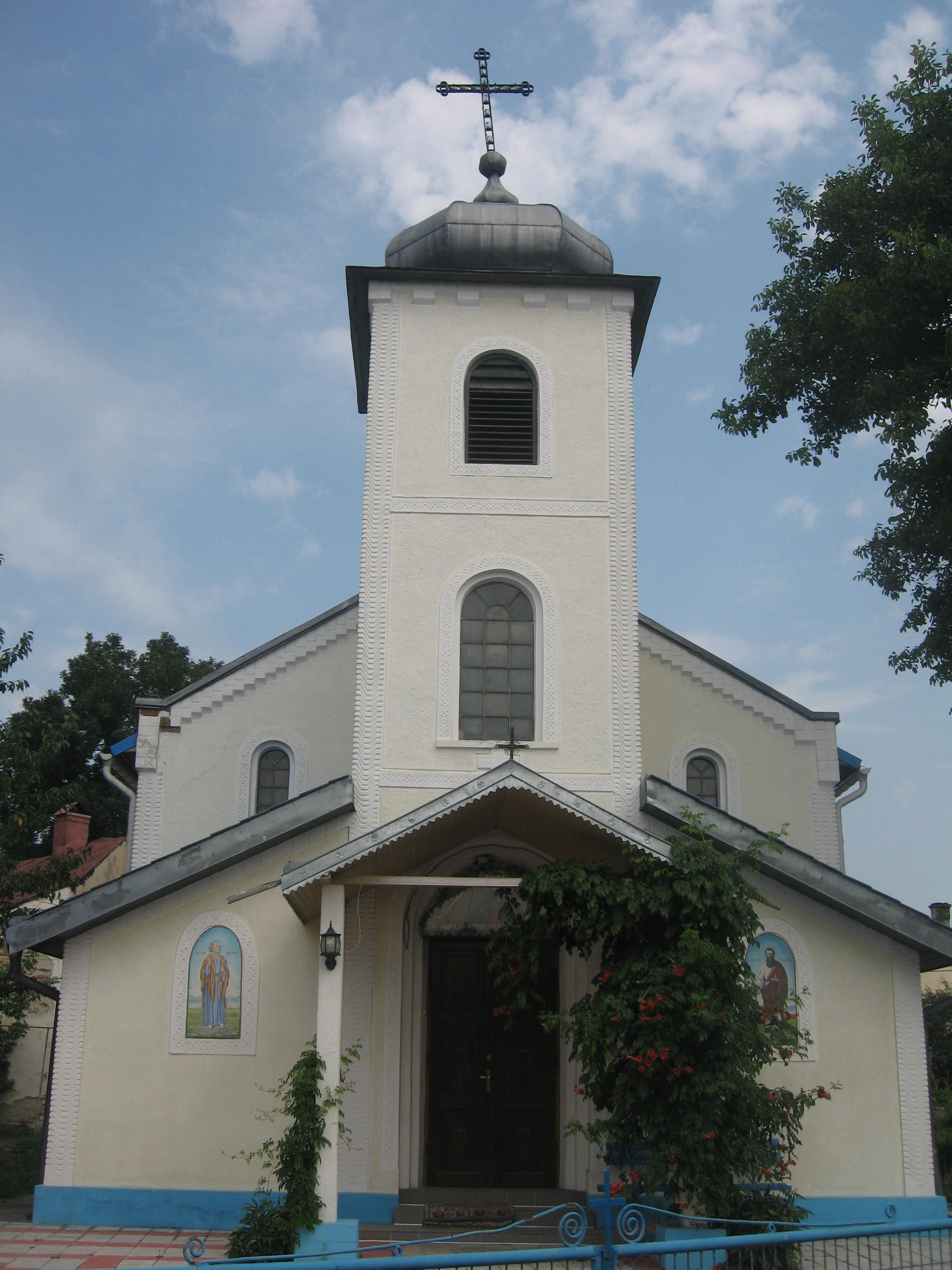 Biserica greco-catolica din Radauti